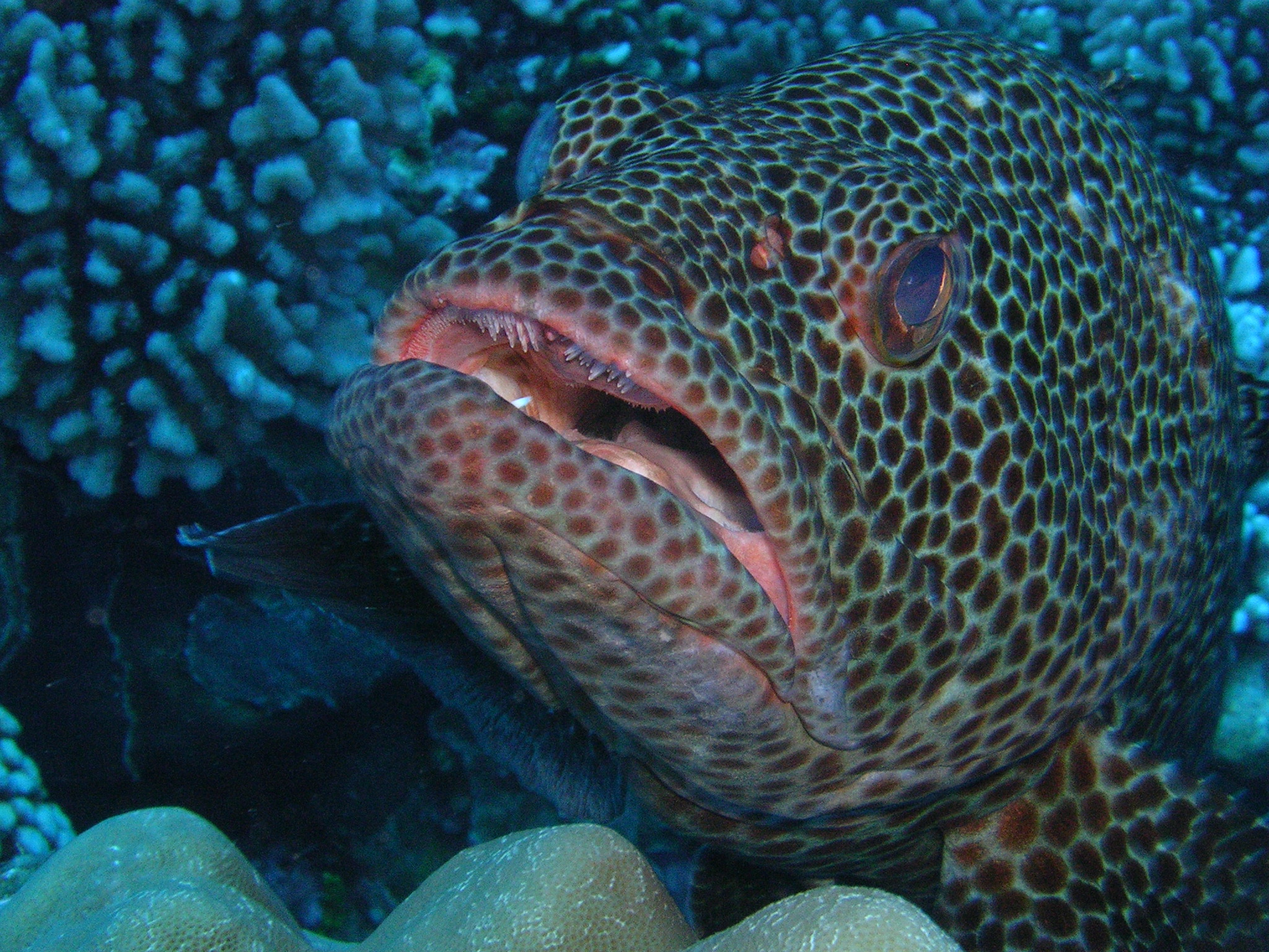 Loche rayon de miel (Epinephelus merra).Tarao Maraurau en tahitien (reo tahiti).